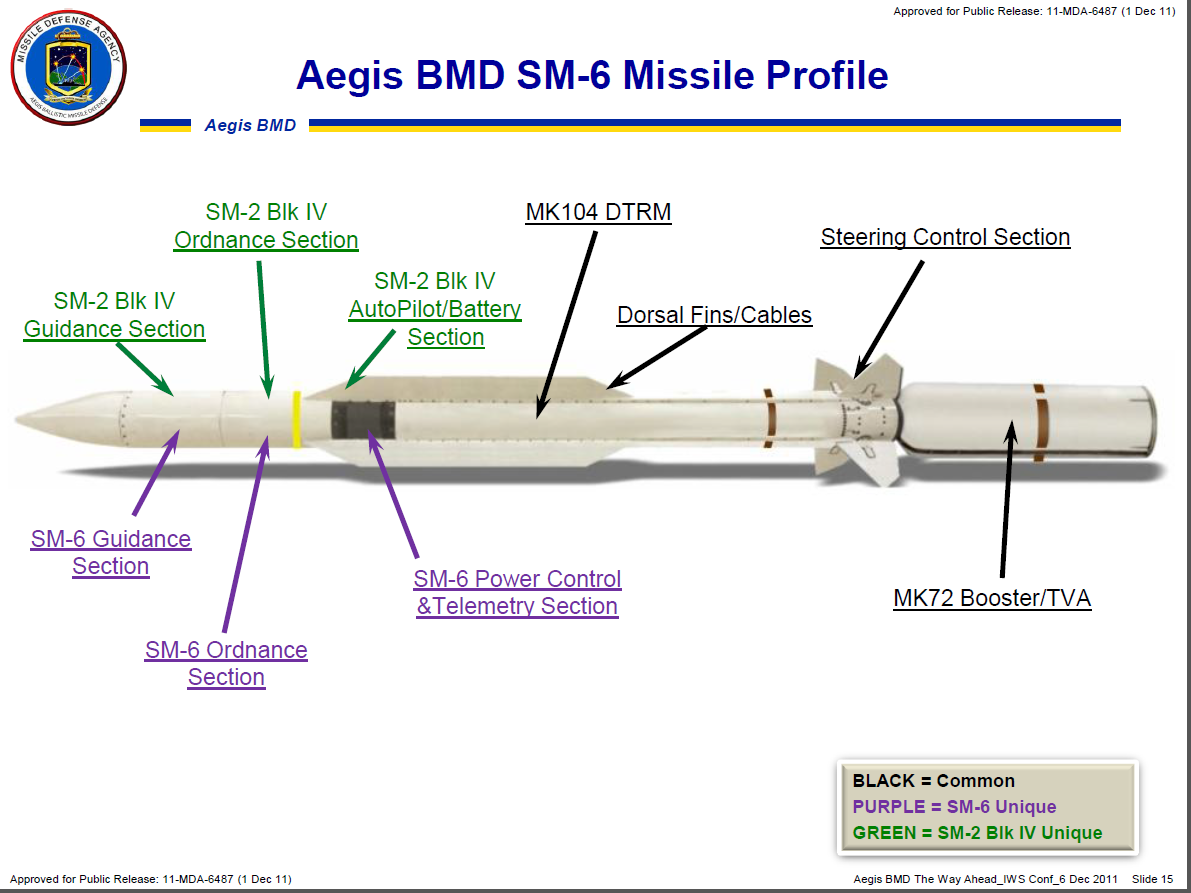 Profil du RIM-174 Standard ERAM (Extended Range Active Missile), ou SM-6 (Standard Missile 6)